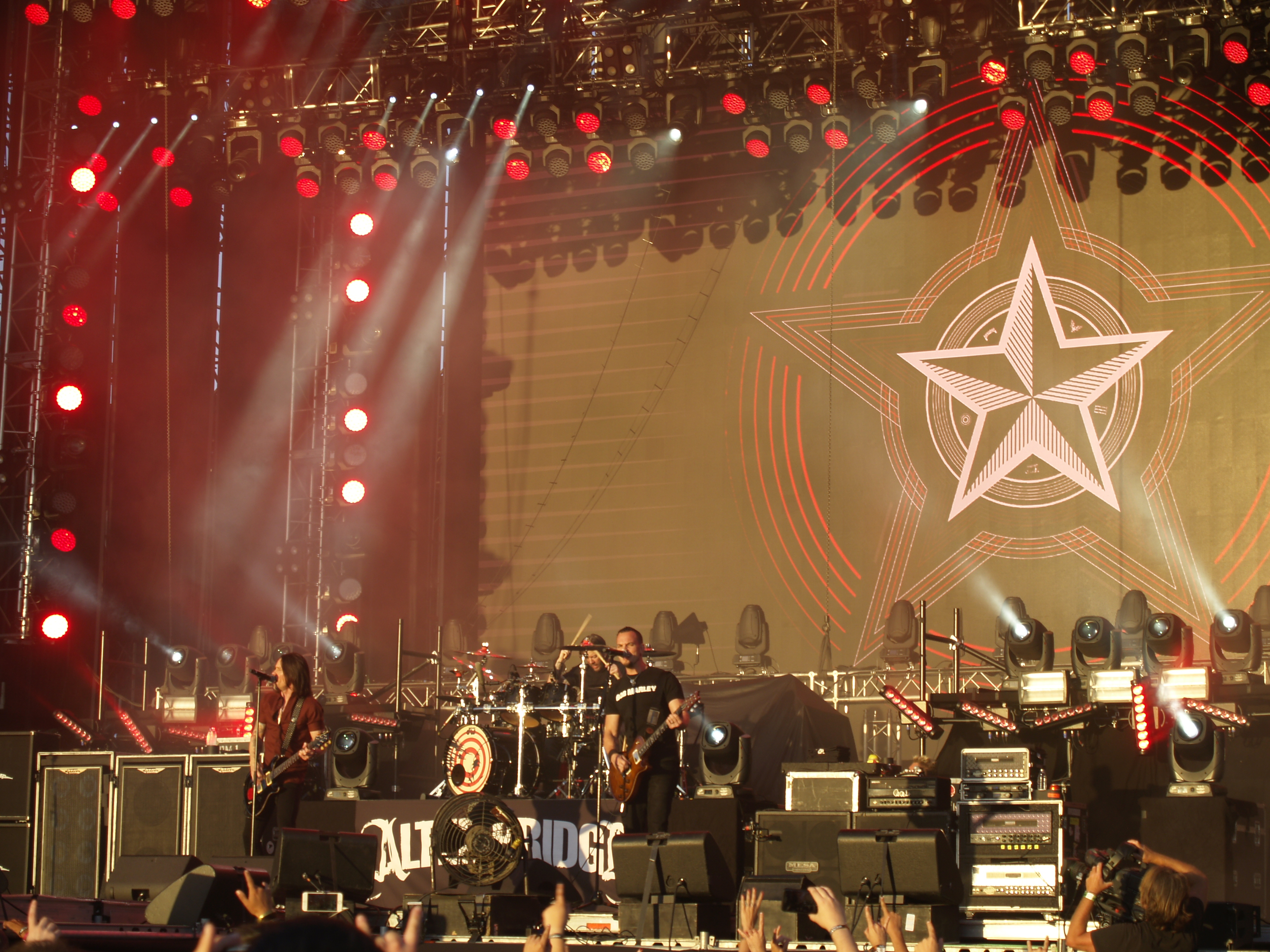 Barcelona Rock Festival 2017 - Alter Bridge